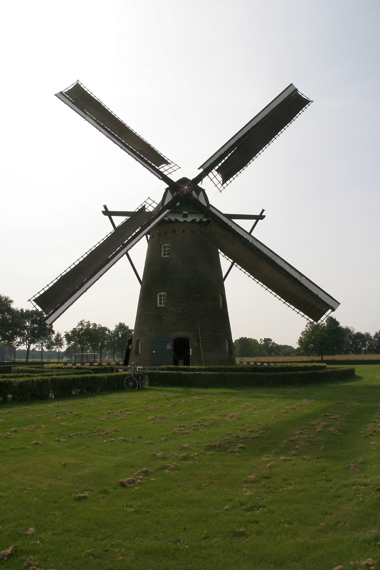 Hapert: naamloze korenmolen